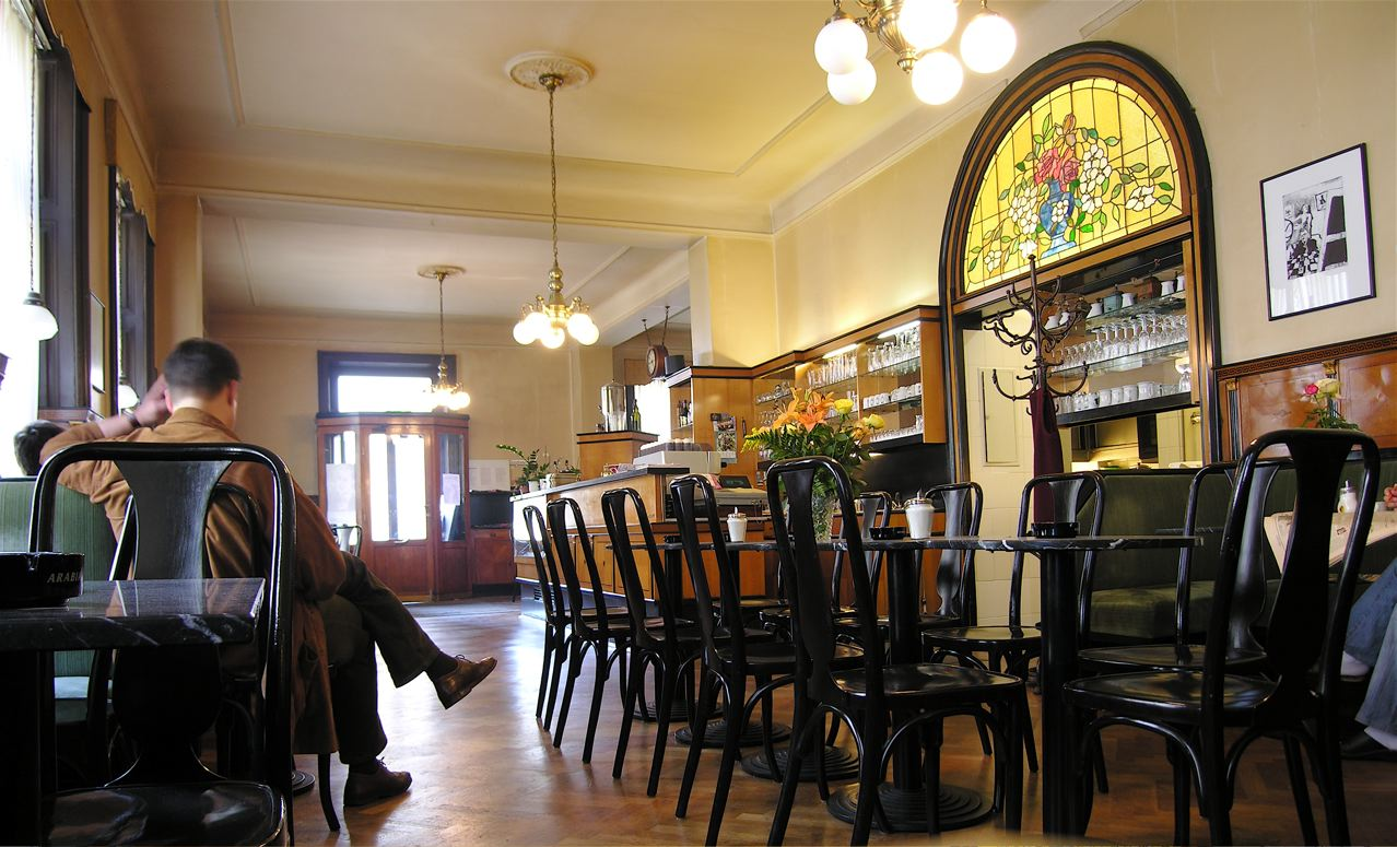 Cafe Goldegg im 4. Wiener Gemeindebezirk (Ecke Goldeggasse/Argentinierstr.)